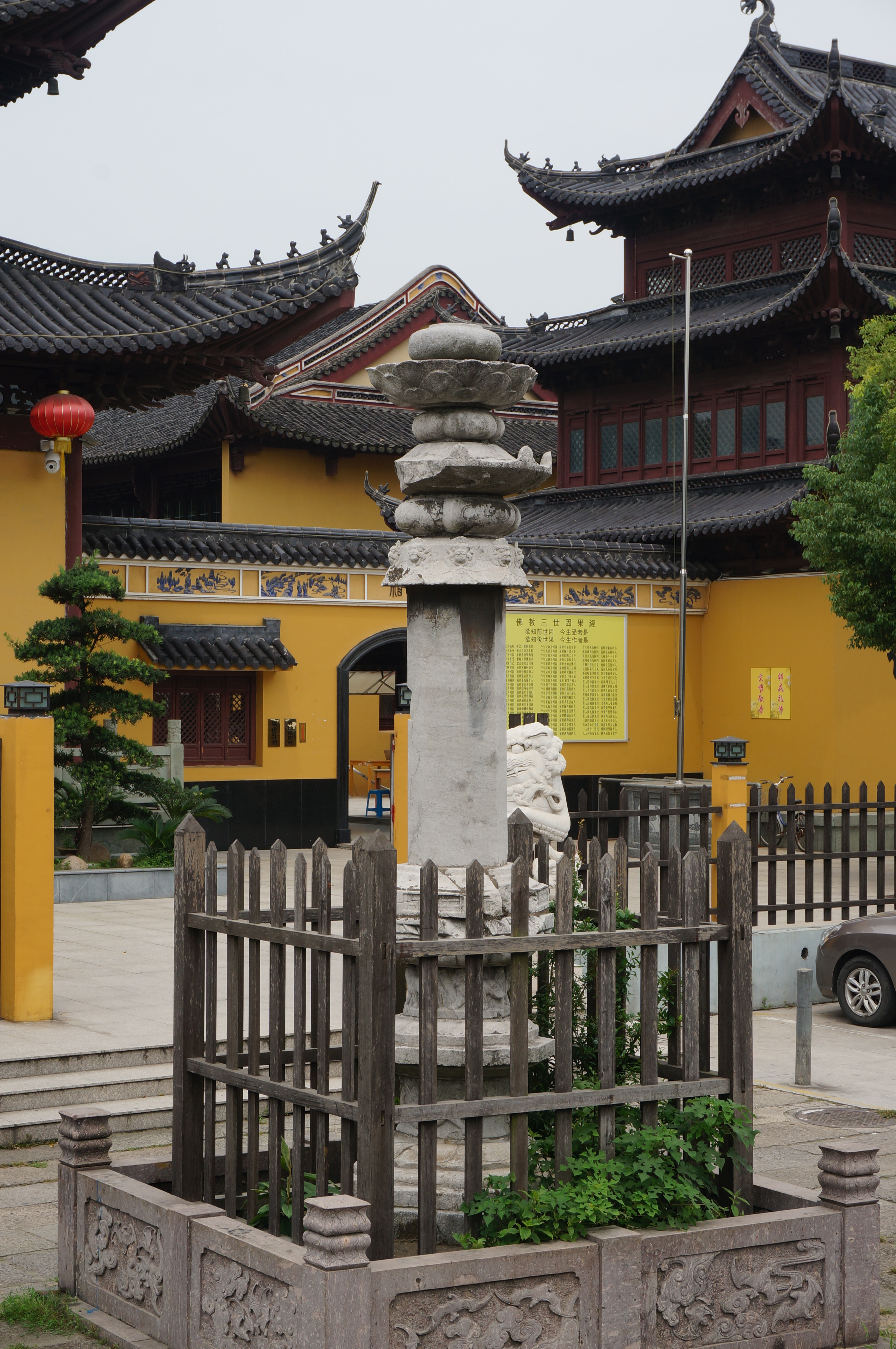 惠力寺，东侧经幢。